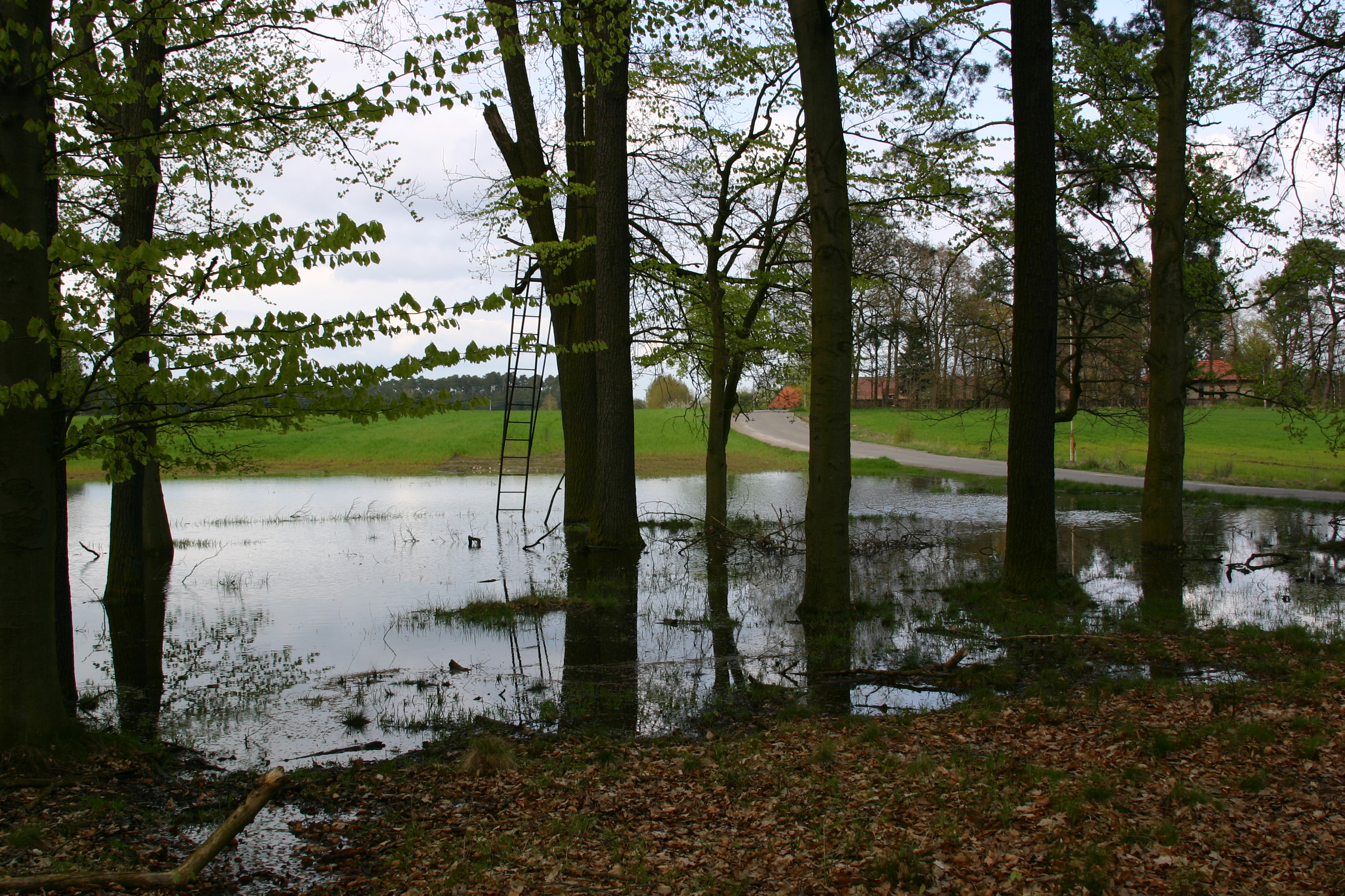 Tugam